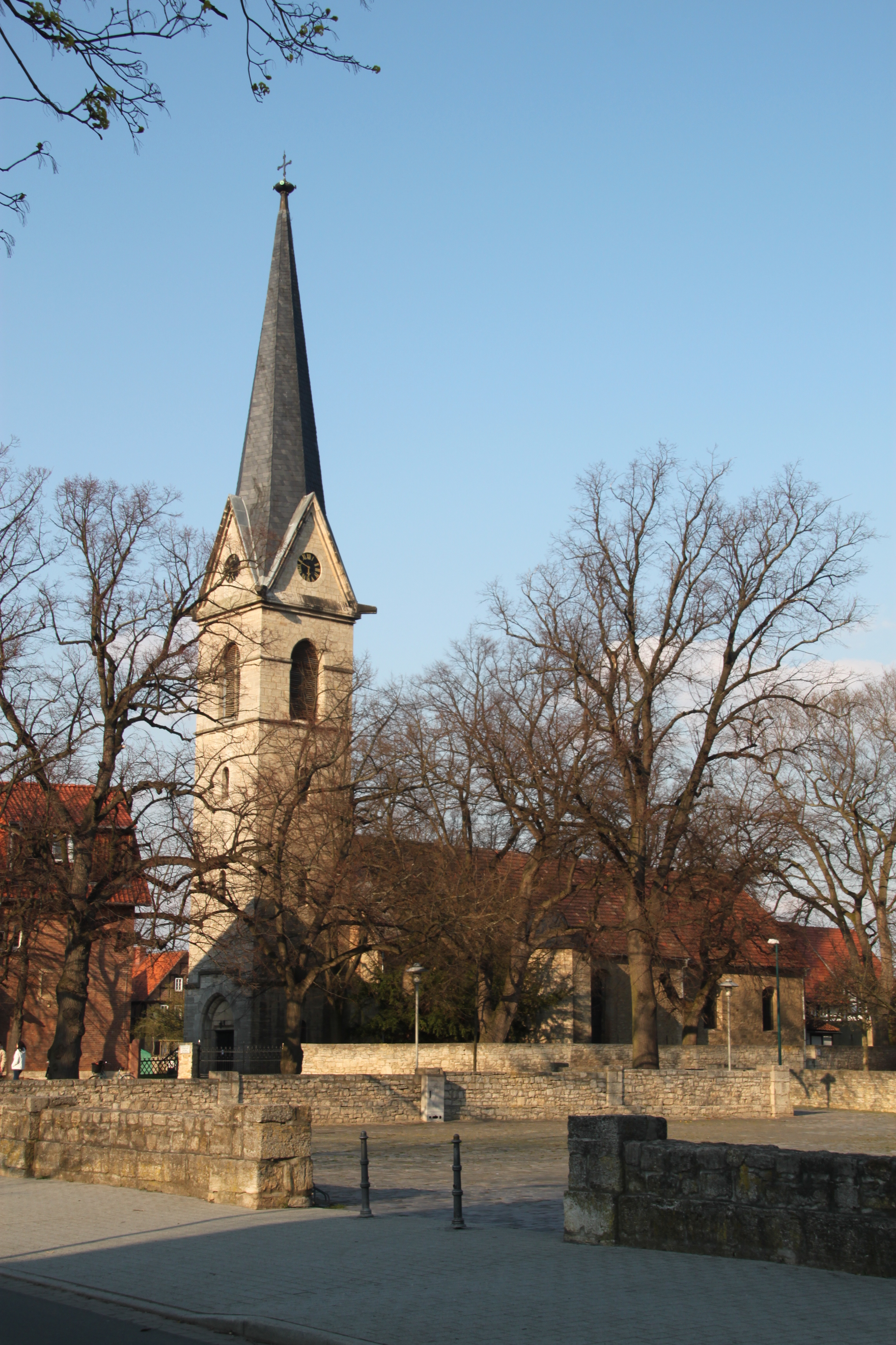 Seeland-Gatersleben, ev. St. Stephanikirche